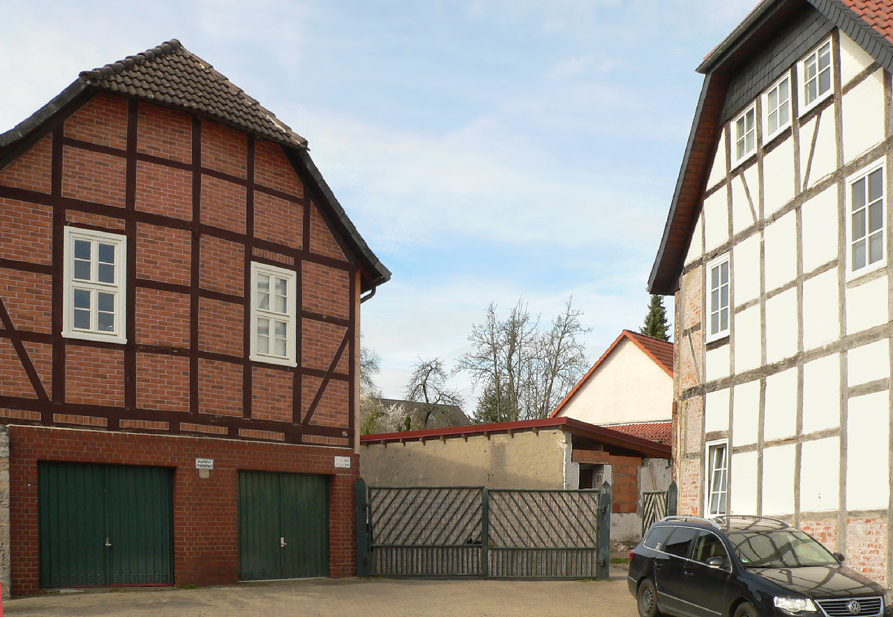 Vorsfelde, Amtsstrasse 49 links mit dem Bereich der früheren Schäferei des Vorwerks mit Schafstall zwischen den Gebäuden